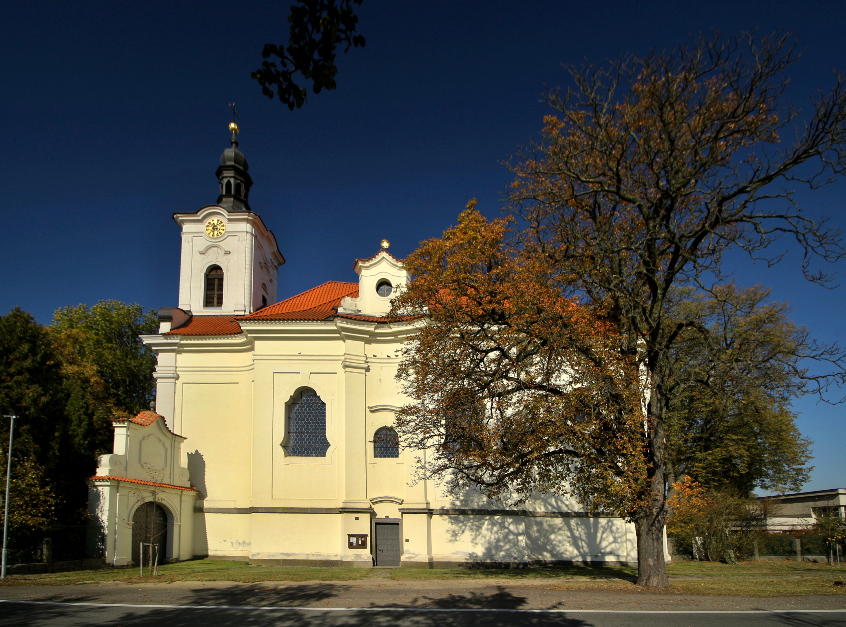 Opařany, okres Tábor